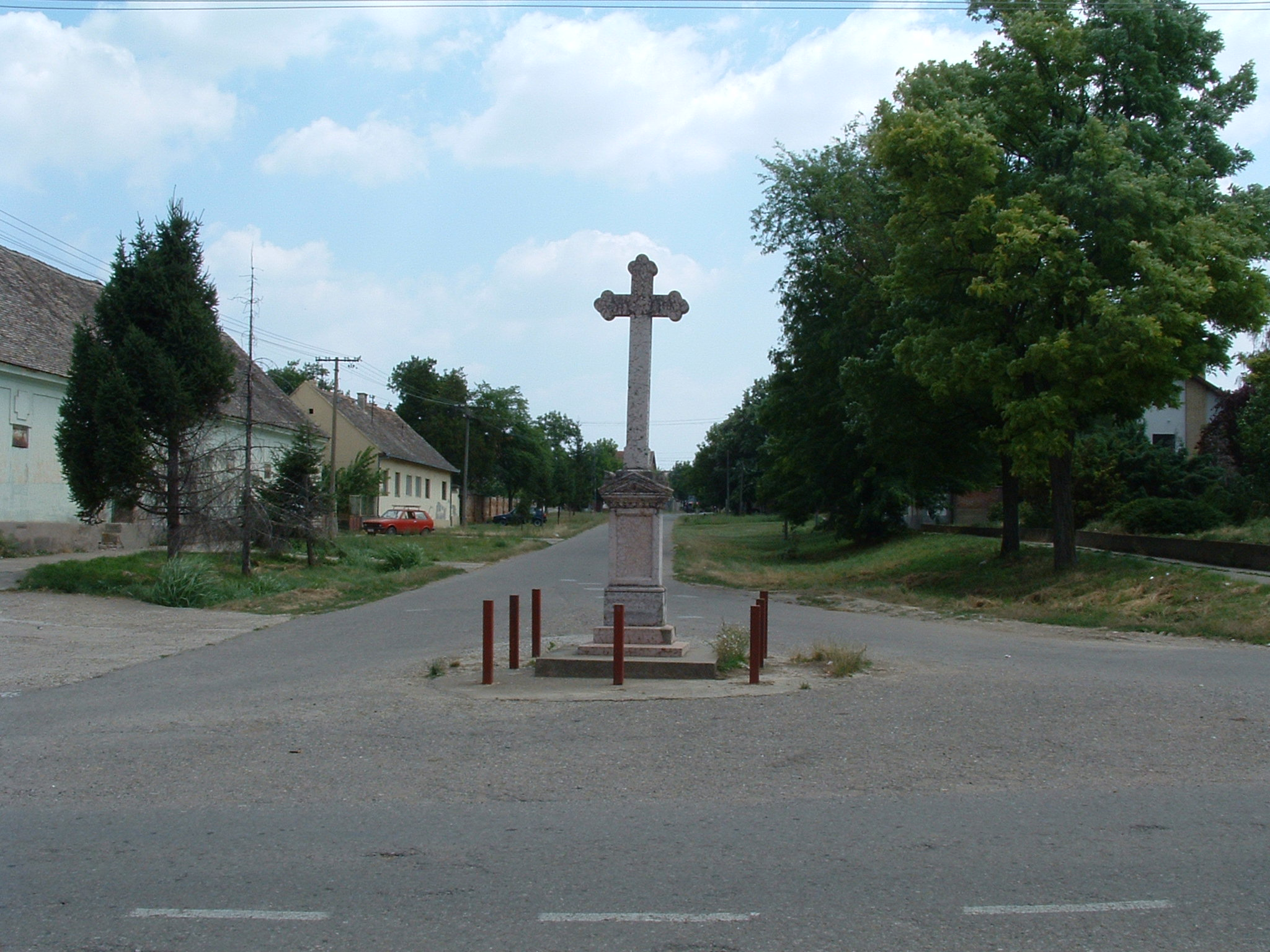 Kříž v centru obce Čalma v Srbsku